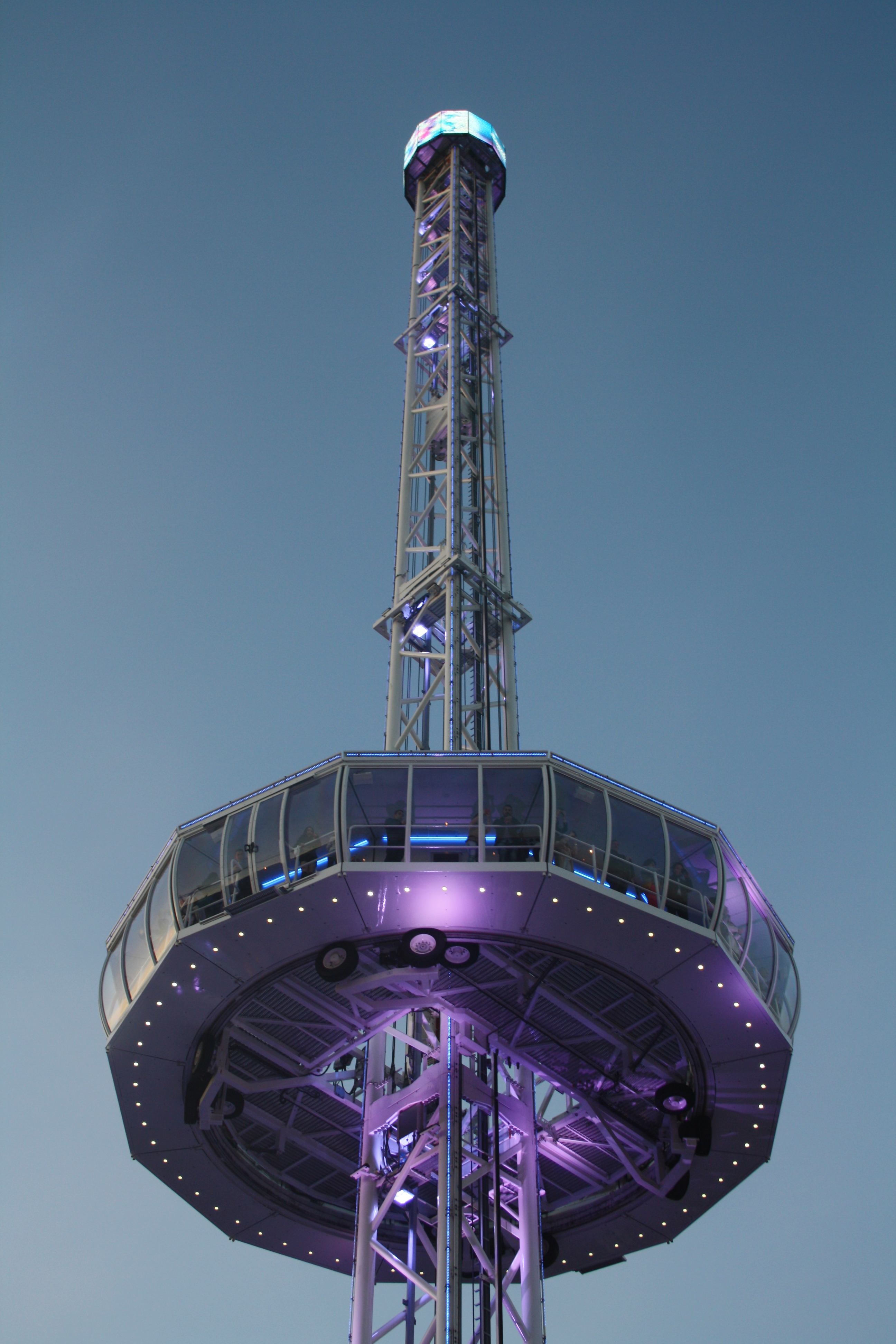 City Skyliner - Kungsträdgården - Eurovision